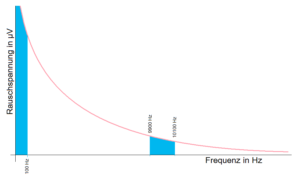 Verringerung der Rauschspannung mit steigender Frequenz